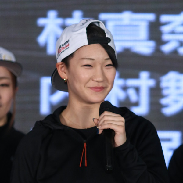 2018年11月23日、小倉競輪場のトークショーにて